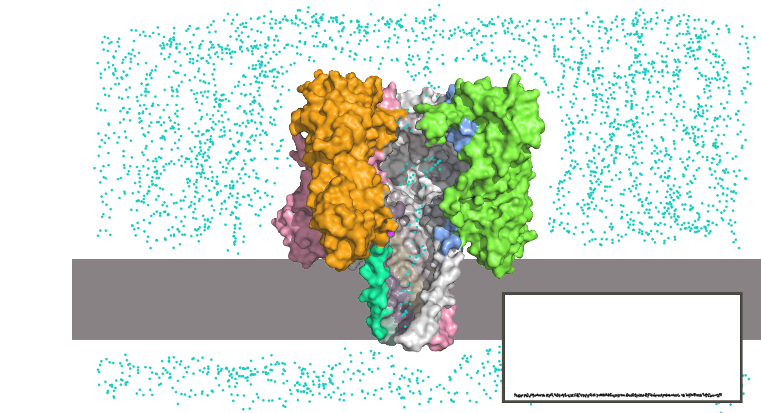 Нанопора альфа-гемолизина в мембране, напряжение отсутствует.